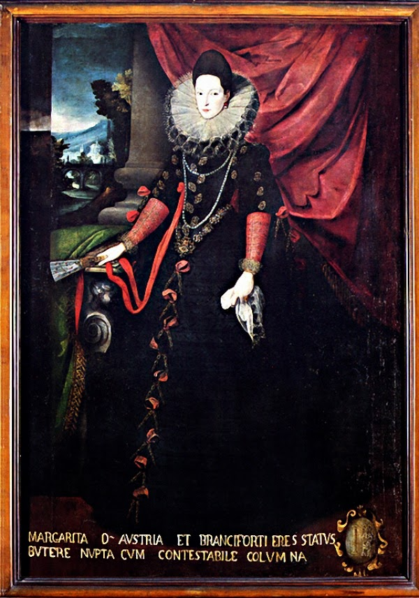 Olio su tela della pittrice Sofonisba Anguissola dipinto intorno al 1603, probabilmente in occasione del matrimonio di Giovanna con Francesco Branciforte, principe di Butera. La tela fu erroneamente interpretata come ritratto di Margherita d'Austria Branciforte, figlia di Giovanna d'Austria.